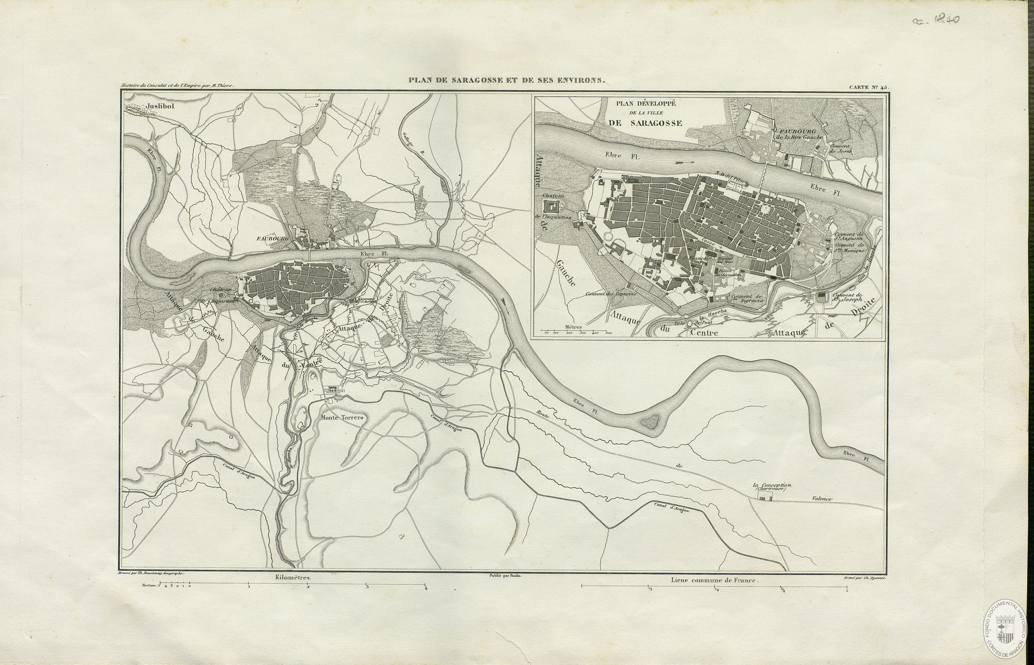 Plan développé de la ville de Saragosse : carte nº. 45 (1840?)